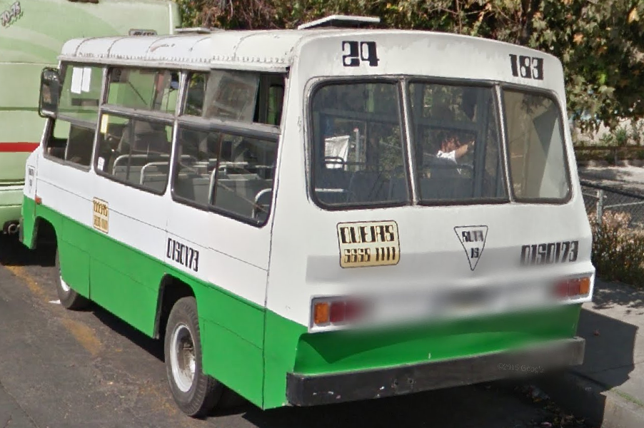 Dodge 1989